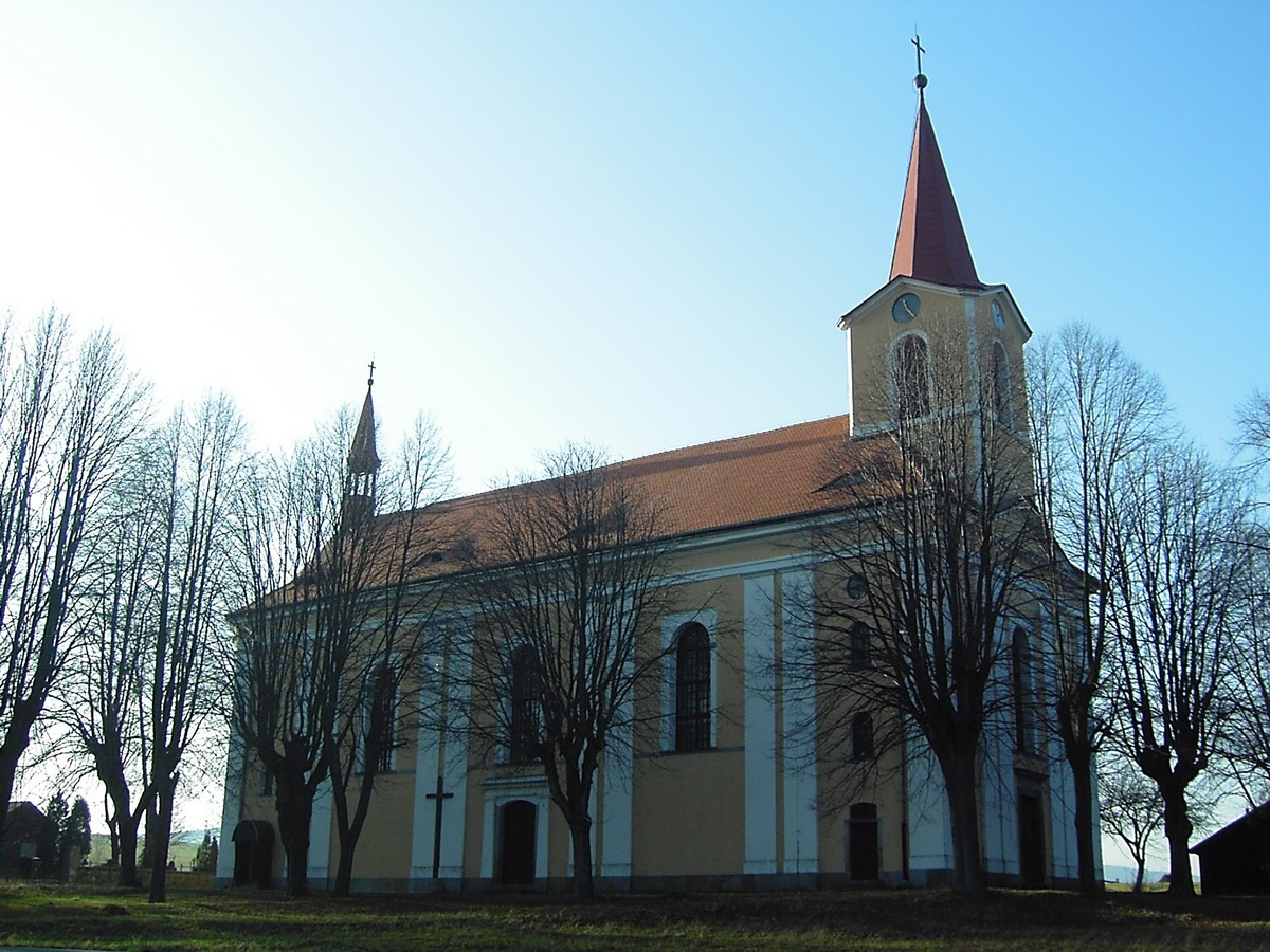 Kostel svatého Vavřince v Království u Šluknova